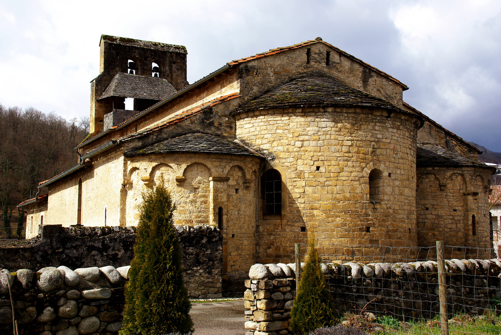 Église Notre-Dame-de-l'Assomption de Vic d'Oust .